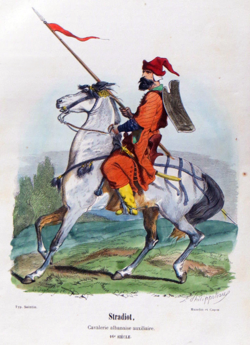 Stradiot Cavalerie albanaise auxiliaire; 16. siècle